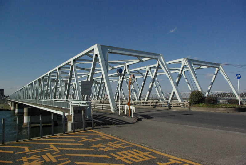 市川橋(市川市側から撮影)